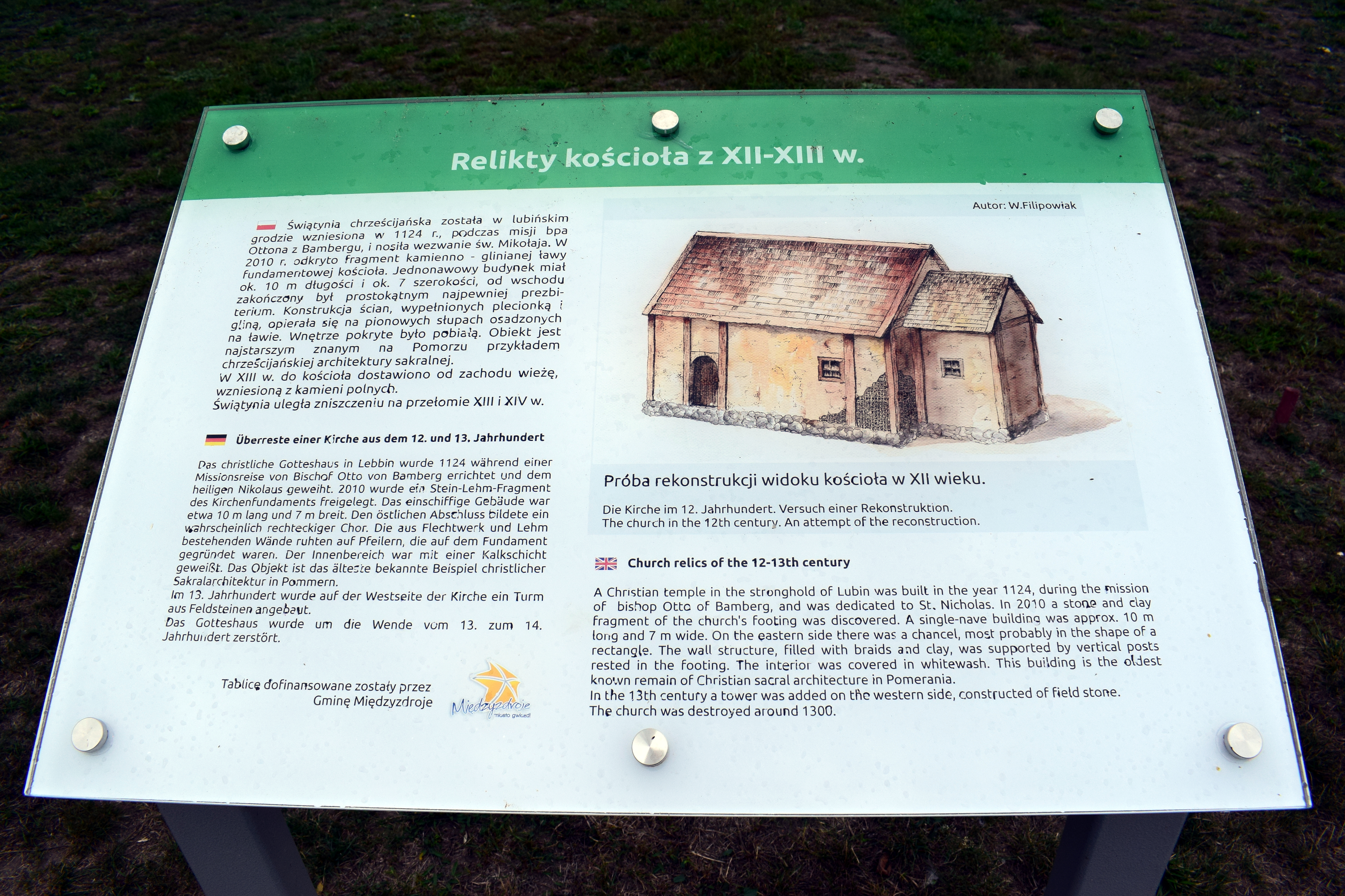 Schautafel am Burgwall Lubin, Informationen zu einer Kirche aus dem 12./13. Jahrhundert, Insel Wolin, Polen.